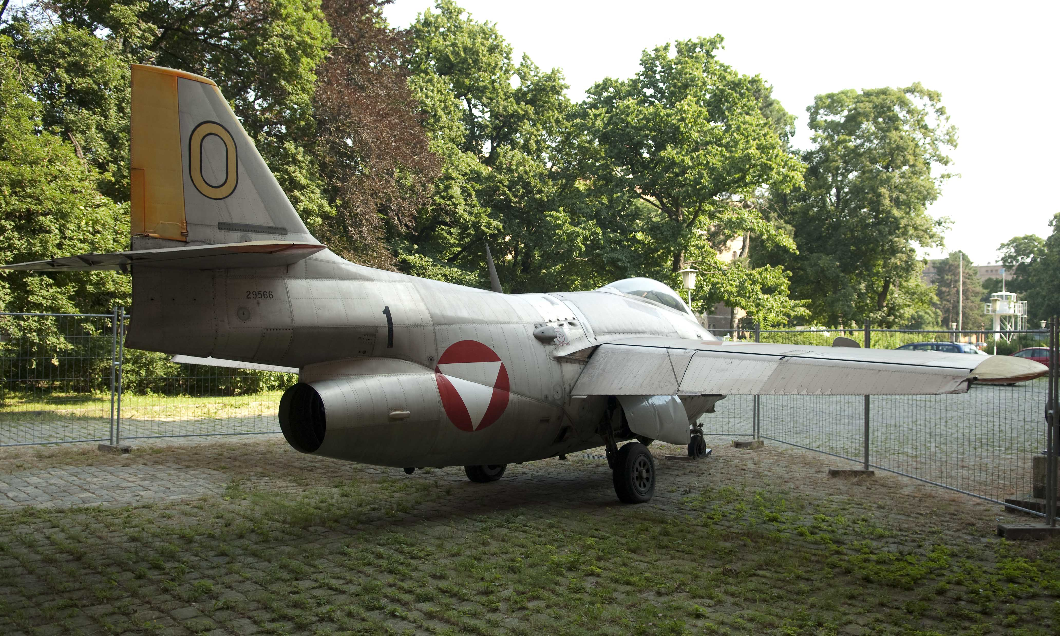 Saab J 29F Tunnan („fliegende Tonne“) vor dem Heeresgeschichtlichen Museum in Wien